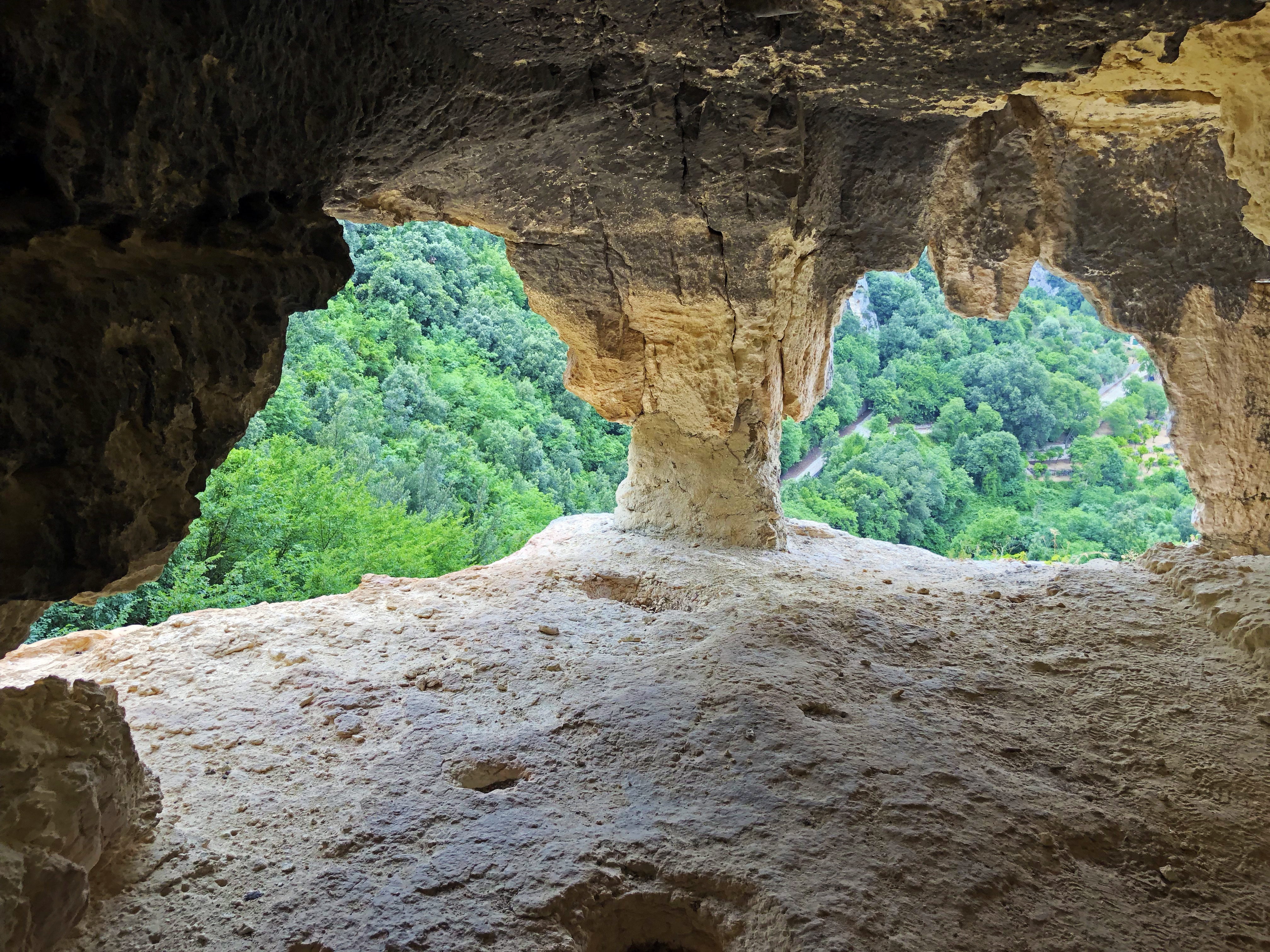 Ambienti rupestri specchi